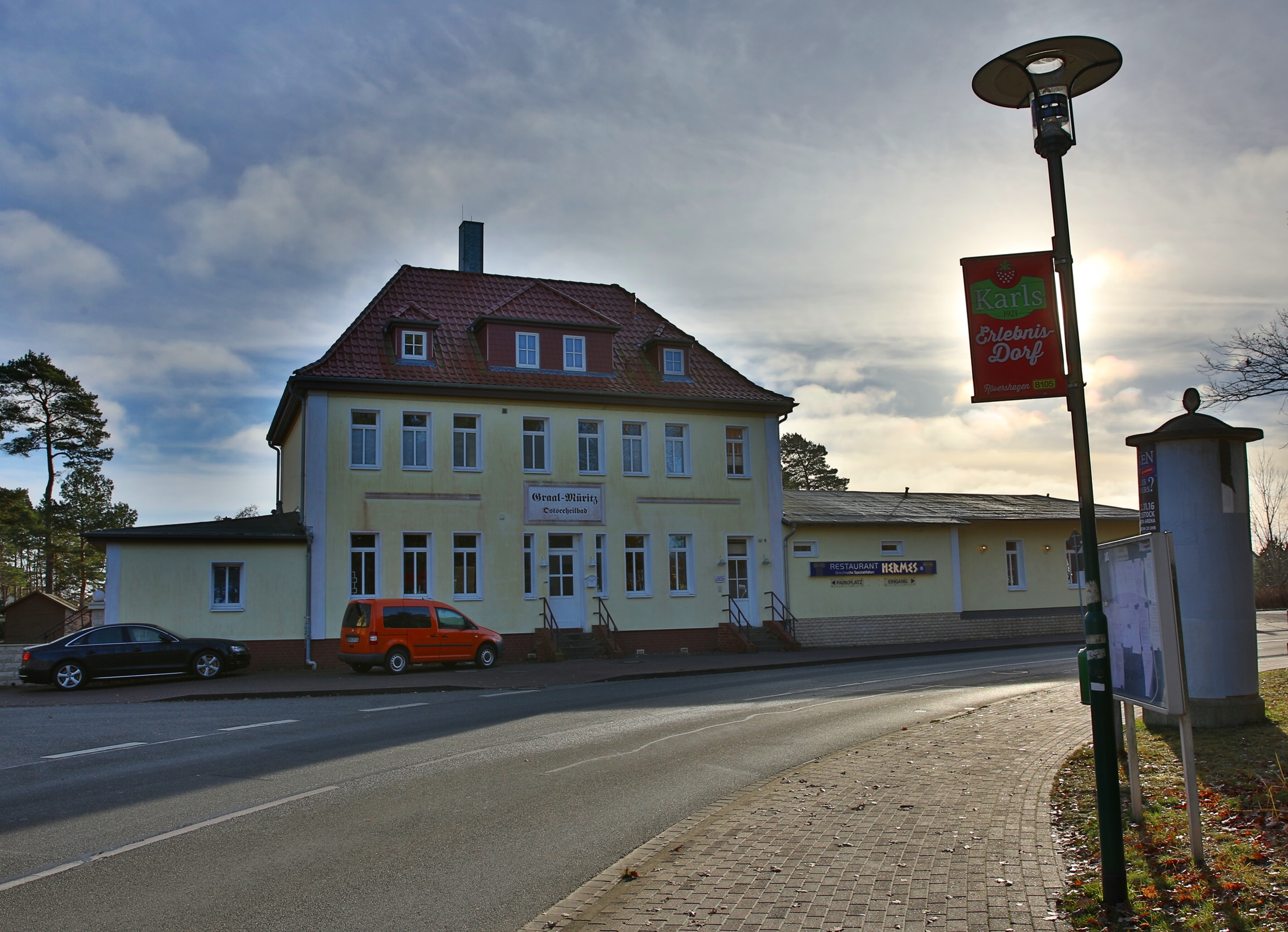 Empfangsgebäude des ehemaligen Bahnhofs Graal-Müritz. Das Gebäude wird derzeit als Restaurant genutzt.